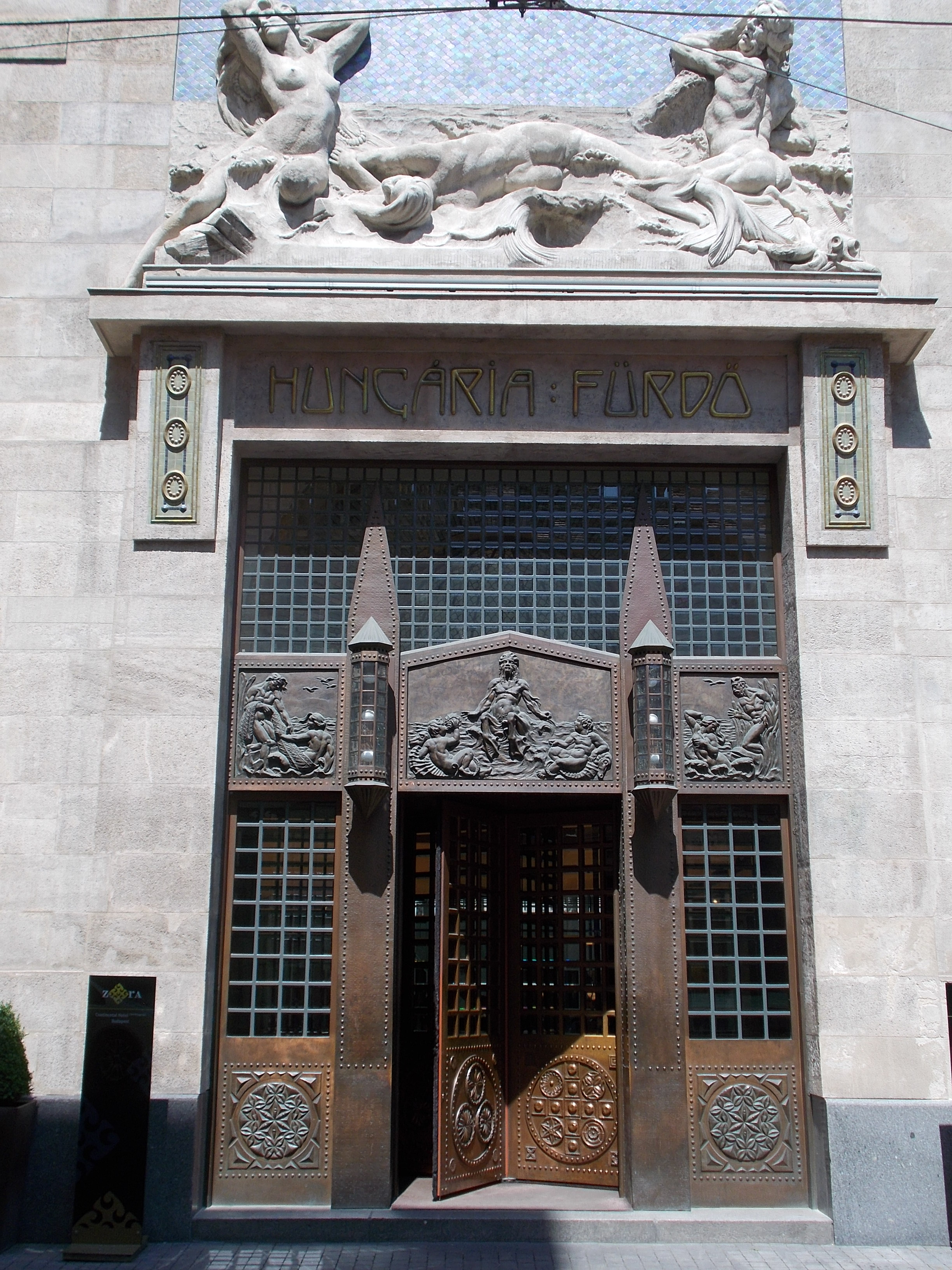 Volt Hungária Fürdő. Műemlék ID 11525. Bronzkapu forgóajtóval. - Budapest, VII. Dohány utca 44